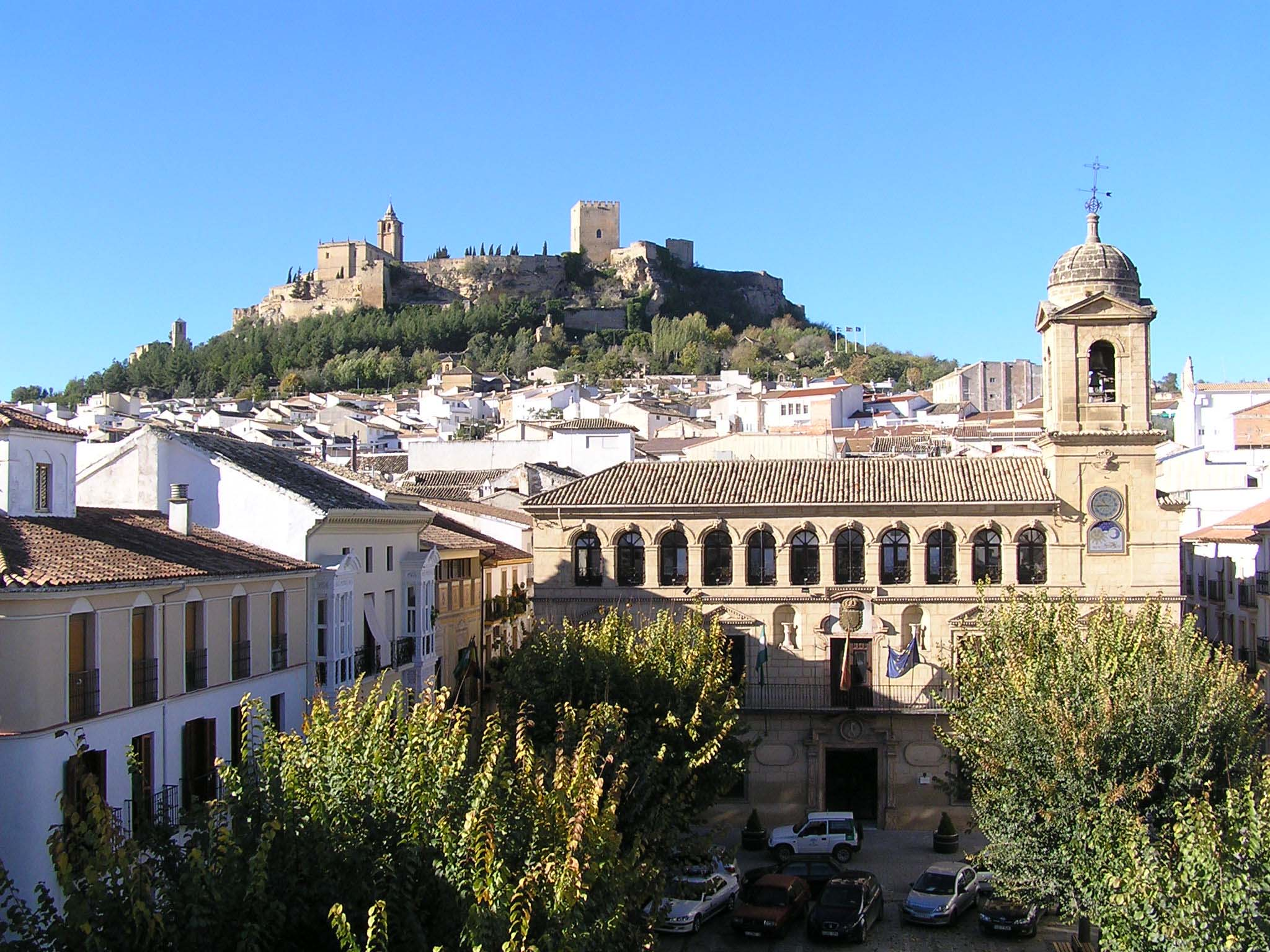 Imagen panorámica de Alcalá la Real, en Jaén (España)